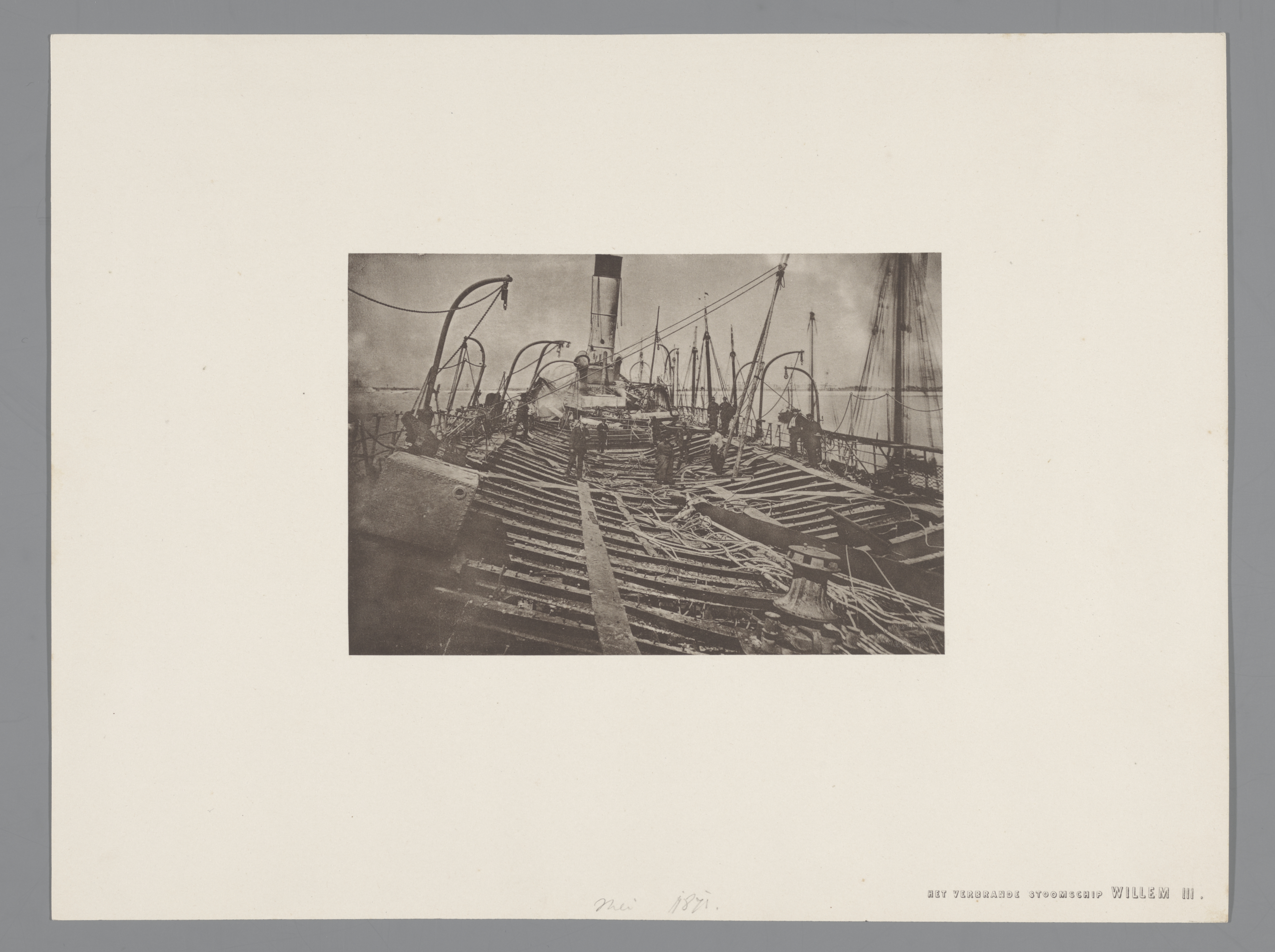 IdentificatieTitel(s): Stoomschip Willem III, na de brand van 1871Het verbrande stoomschip Willem III (titel op object)Objecttype: foto Objectnummer: RP-F-00-918Catalogusreferentie: FMH 7435Omschrijving: Het uitgebrande wrak van het schroefstoomschip Willem III voor de haven van Portsmouth, enkele dagen na de brand van 19 mei 1871. Zie ook de pendant.VervaardigingVervaardiger: fotograaf: Wegner & Mottu (vermeld op object)fotograaf: Louis Wegnerfotograaf: Pierre Alexis Mottudrukker: Wegner & MottuPlaats vervaardiging: AmsterdamDatering: 1871Fysieke kenmerken: papier op kartonMateriaal: papier karton Techniek: lichtdrukAfmetingen: afbeelding: h 109 mm × b 162 mmOnderwerpWat: ships (in general) (+ propulsion of vehicle, ship, etc. by steam)steamship, motorshipWanneer: 1871-05-19 - 1871-05-19Waar: PortsmouthWie: Willem III (schip)Verwerving en rechtenVerwerving: aankoop 1881Copyright: Publiek domein